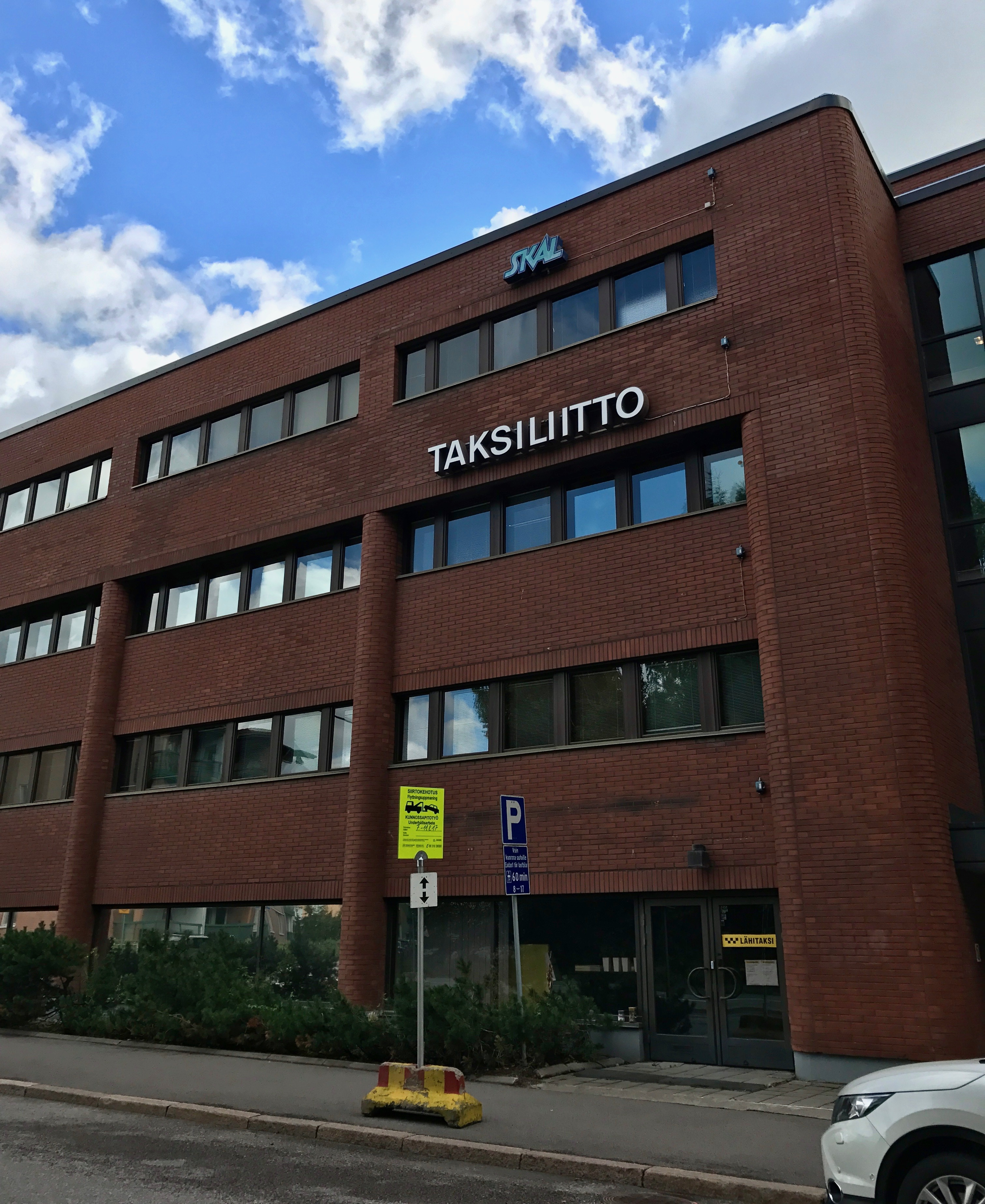 Taksiliiton toimisto Helsingin Pohjois-Haagassa.